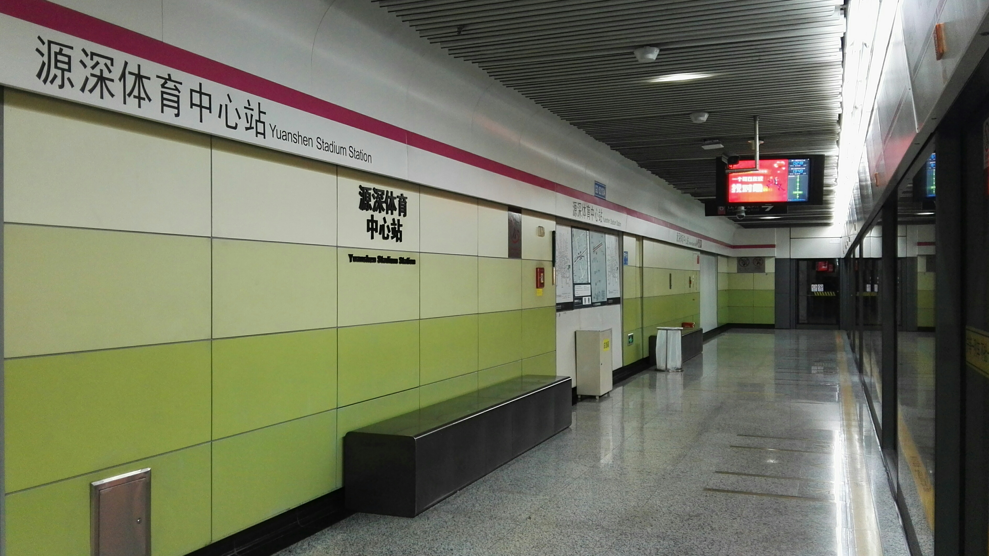 源深体育中心站港城路方向站台